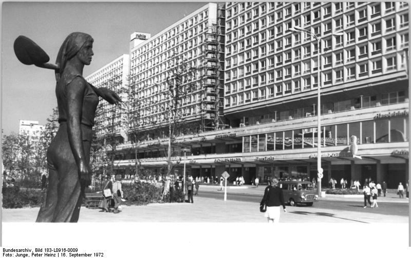 ADN-ZB Junge 16.9.72 Berlin: Blick auf die neuen Wohn- und Geschäftshäuser in der Rathausstraße, die sich zu einem beliebten Einkaufszentrum der Berliner und ihrer Gäste entwickelt hat.